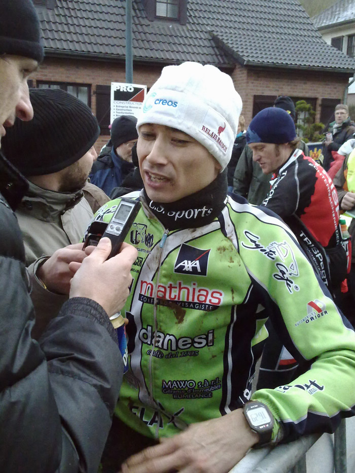 De Gusty Bausch, nodeems datt en de Cyclo-Cross Championnat 2012 zu Keel gewonnen huet.